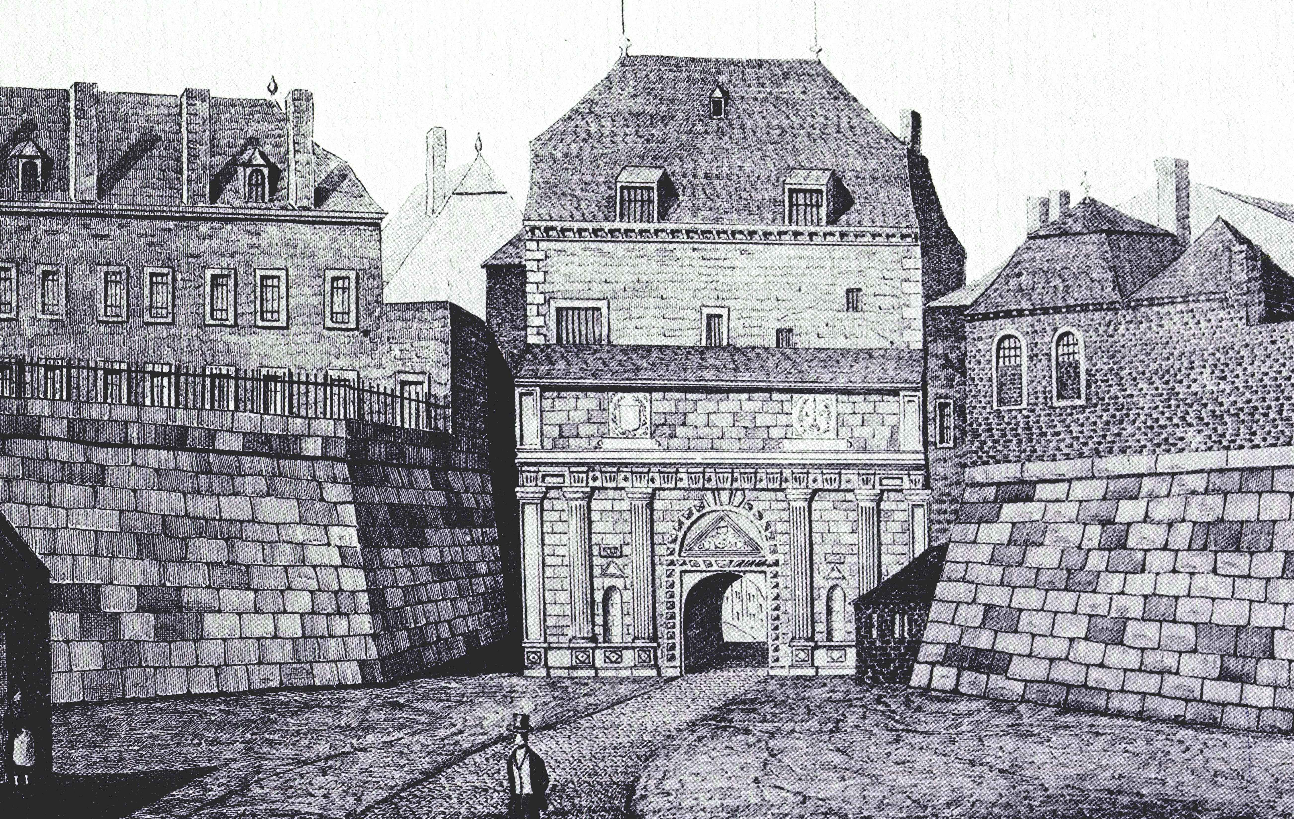 St. Leonard-Paart